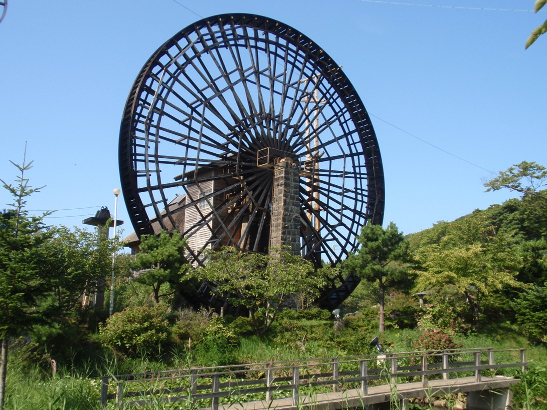 みちのく温泉前にある大水車